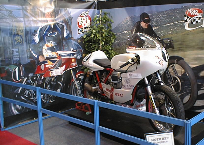 Guzzi Moto Bel' - Moto Revue Classic n° 12, victorieuse au Bol d'or classic 2003 sur le circuit de Nevers Magny-Cours, le lundi 14 juillet 2003, au cumul des 3 manches. Pilotes : Christophe Charles-Artigues et Daniel Moquet. Exposée au Mondial du deux roues de Paris en octobre 2003. Note : la Guzzi Moto Bel' - Moto Revue Classic n° 13, pilotée par Christophe Gaime et Éric Maurice, finit à la 7e place.